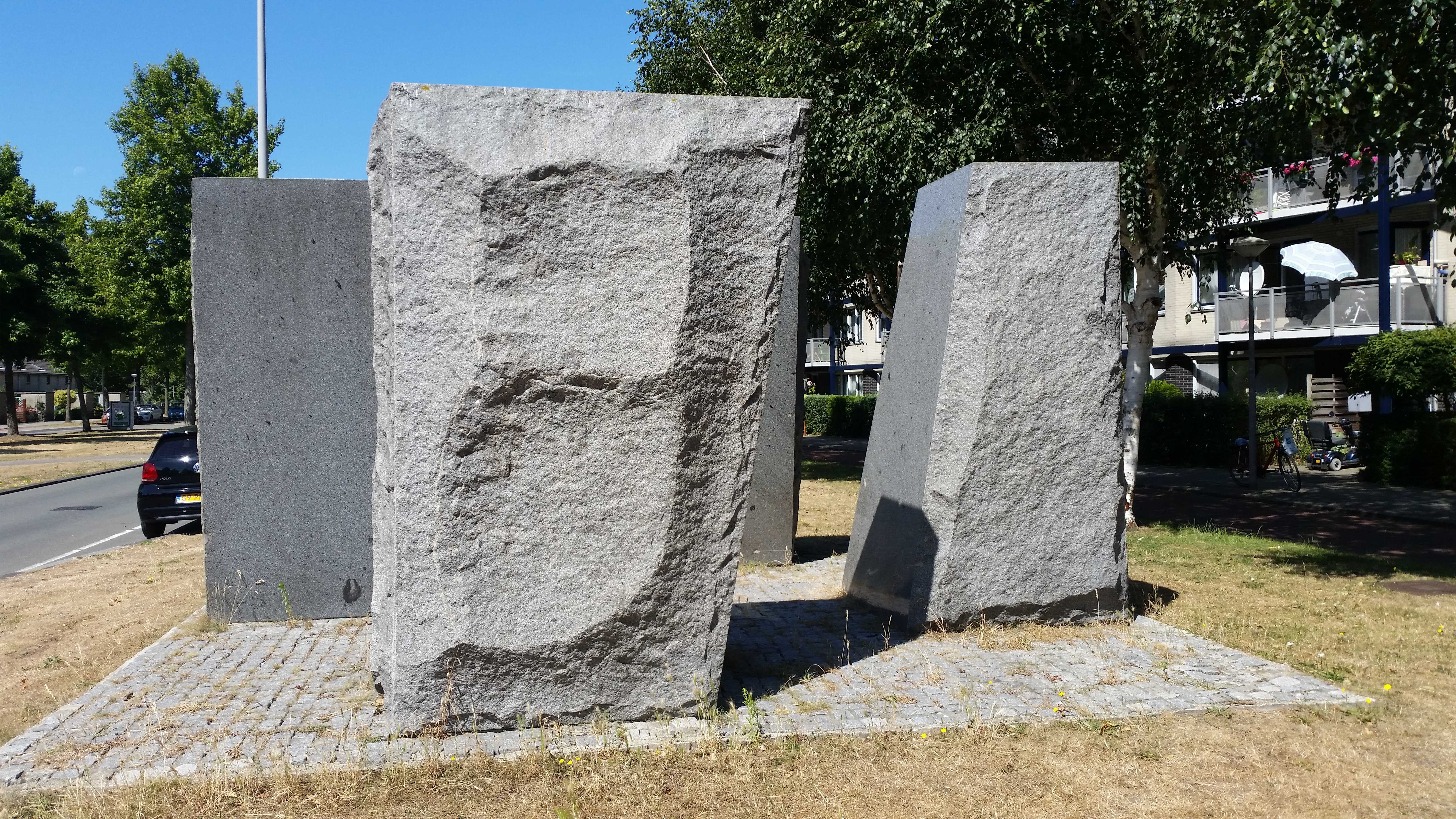 Vier vormen in graniet van André Volten, naar het westen toe